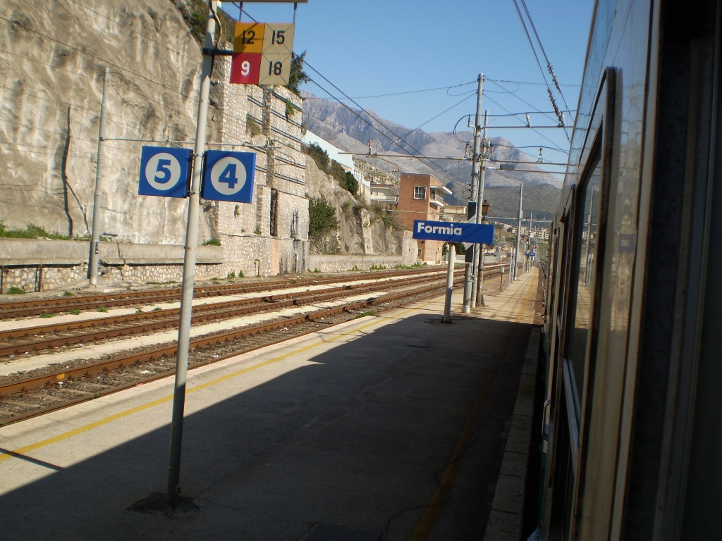 La stazione di Formia-Gaeta